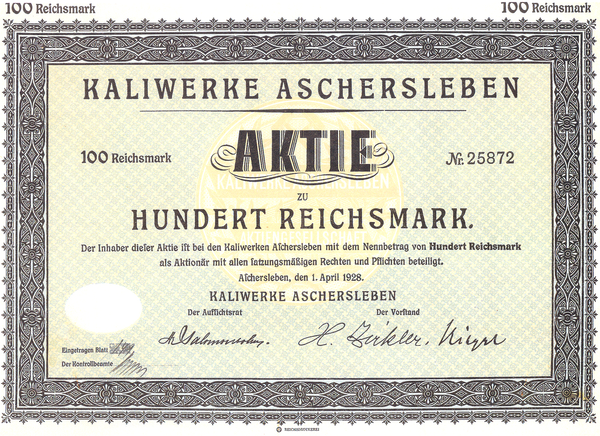 Aktien-Schein der Kaliwerke Aschersleben